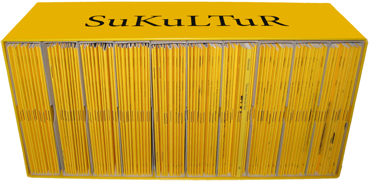 Die „BOX“ des SuKuLTuR-Verlags umfasst die ersten hundert Hefte der Reihe „Schöner Lesen“. Das Foto wird hier unter die CC by-sa 3.0 gestellt.